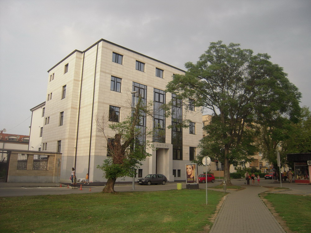 Академија наука и умјетности Републике Српске